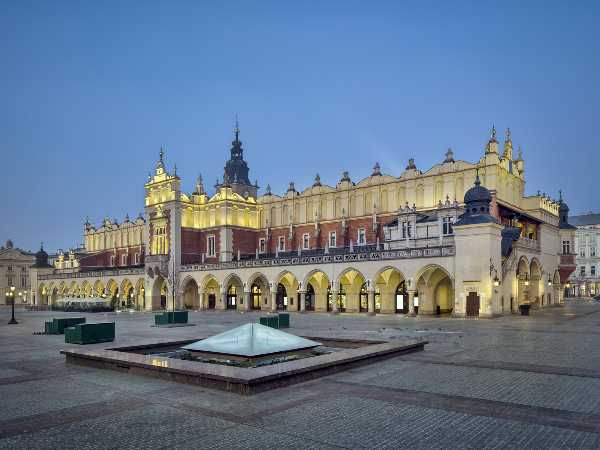 Budynek sukiennic widziany od strony Katedry Mariackiej.